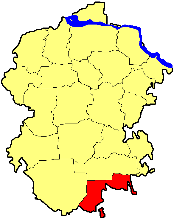 Шемуршинський район Чувашії